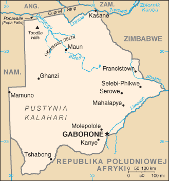 Mapa Botswany z CIA World Factbook